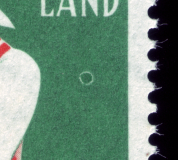 Butzen, Druckfehler durch Schmutzpartikel auf der Druckform oder auf dem Gummituch